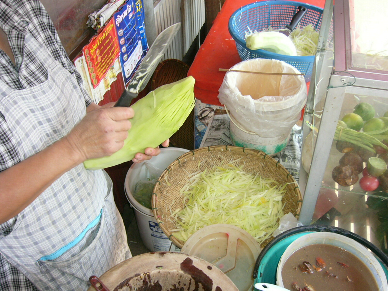 Zubereitung von Som Tam in einer Straßenküche, man beachte die Art und Weise des Zerteilens (Örtlichkeit: Si Songkhram, Thailand)